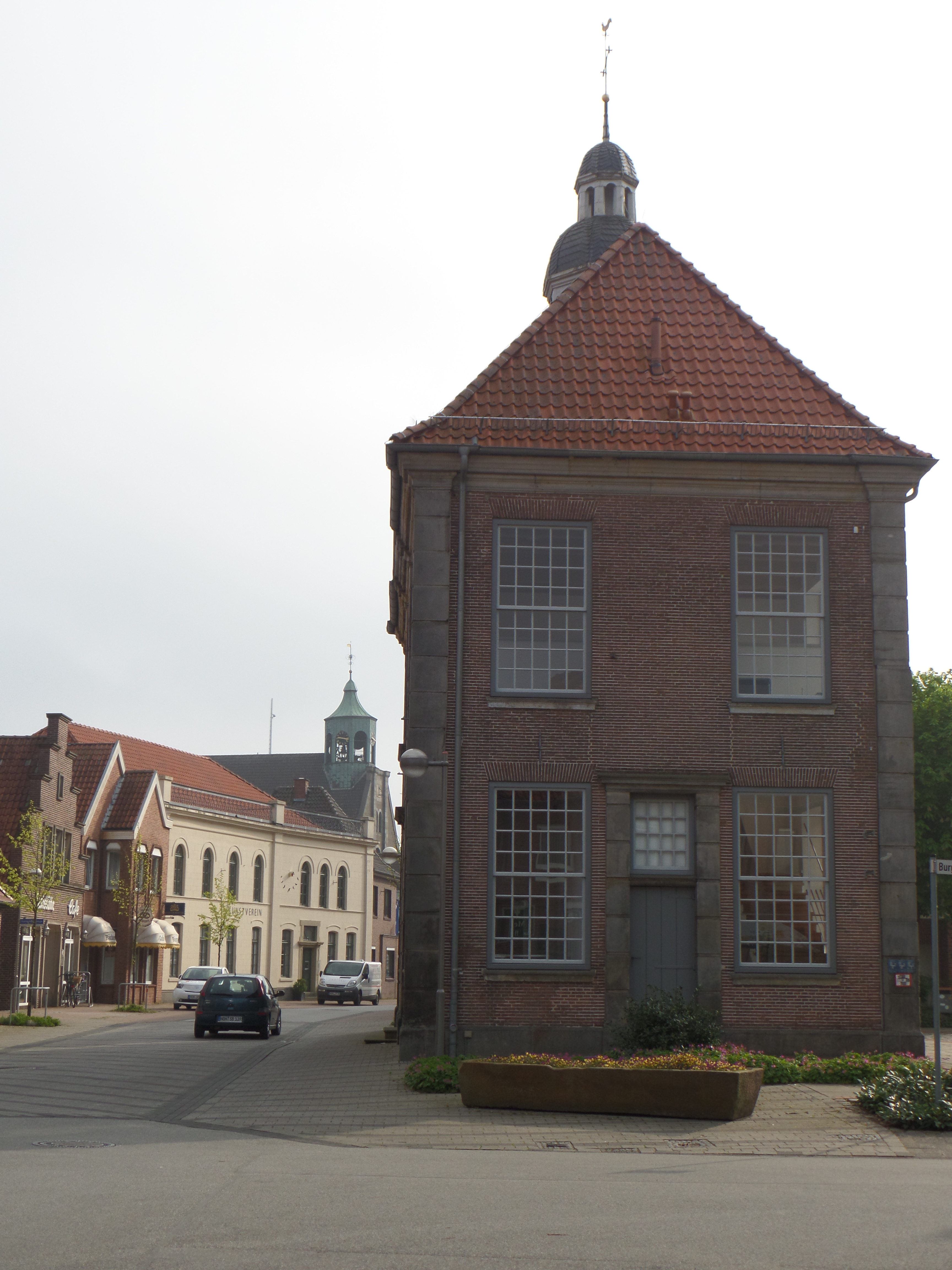 Neuenhaus, Grafschaft Bentheim